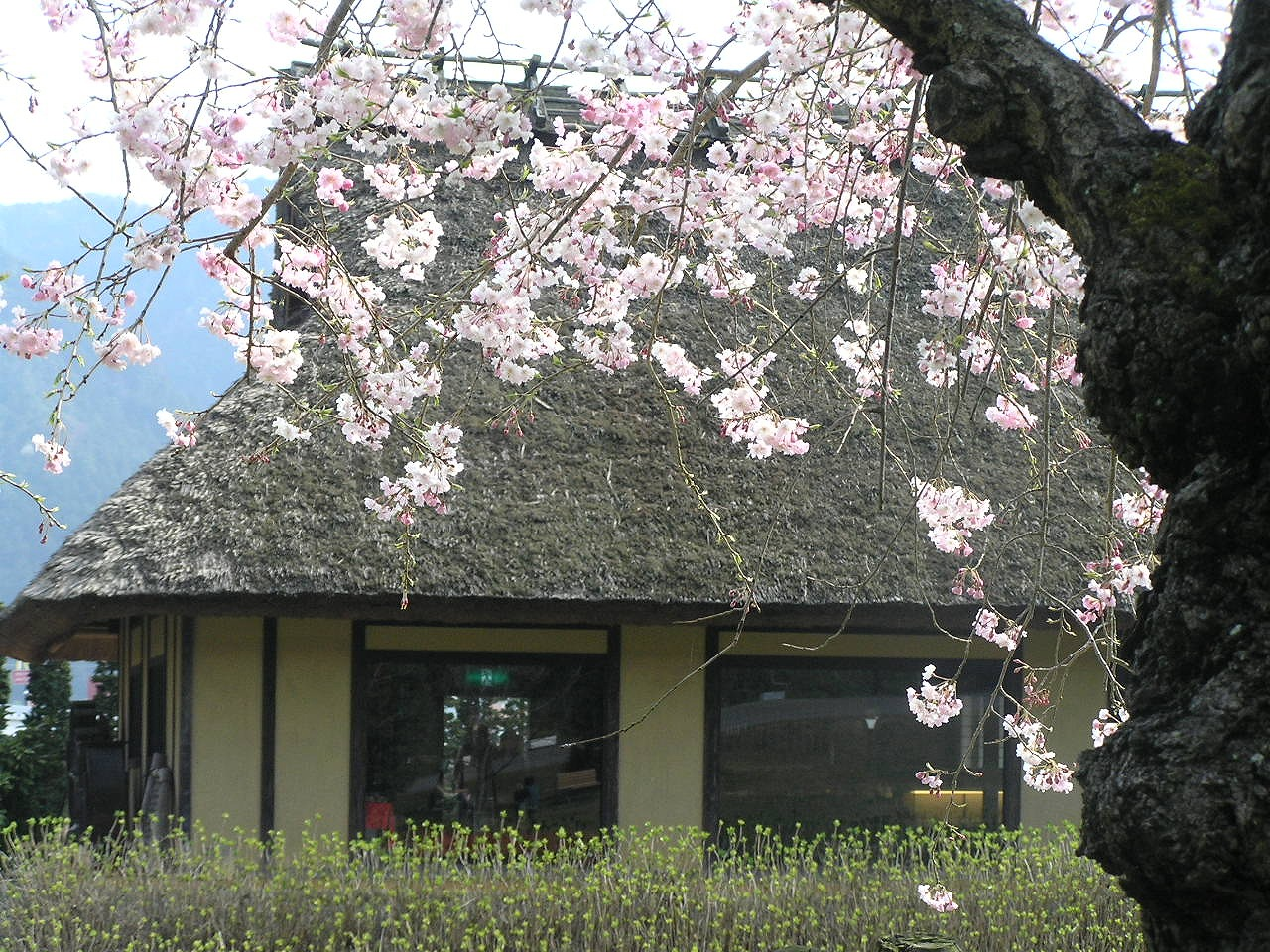 お菓子の里・篠山市茅葺古民家とさくら